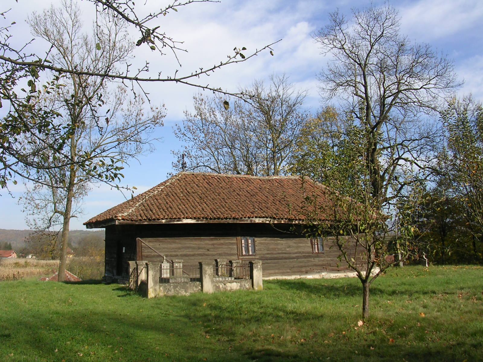 Црква у селу Врба поред пута Краљево-Врњачка Бања